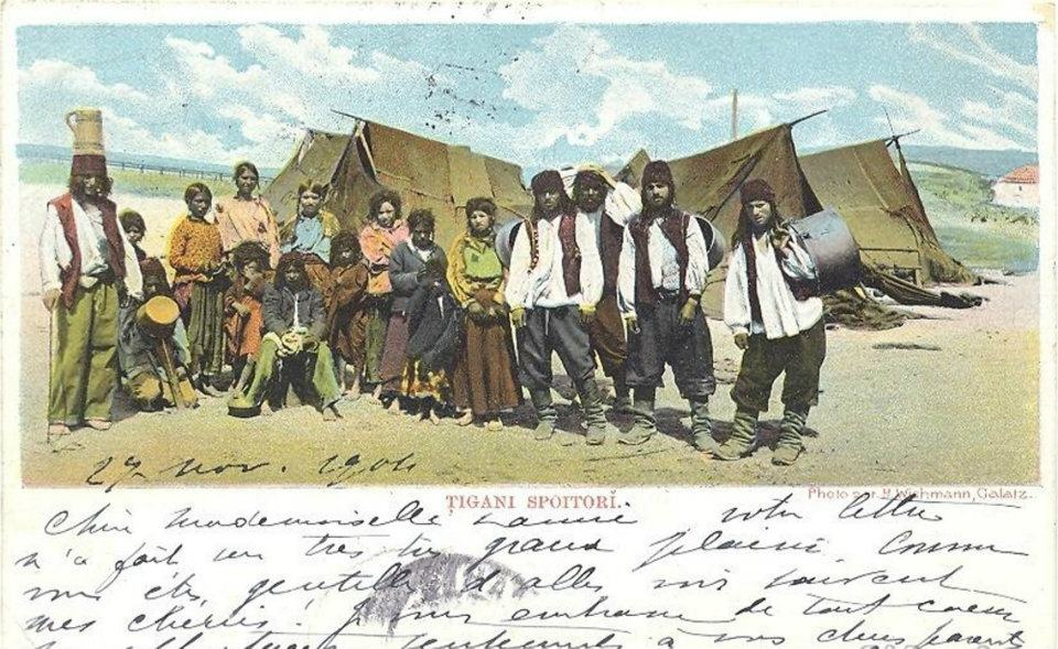 Rumunskí Cigáni - rok 1904